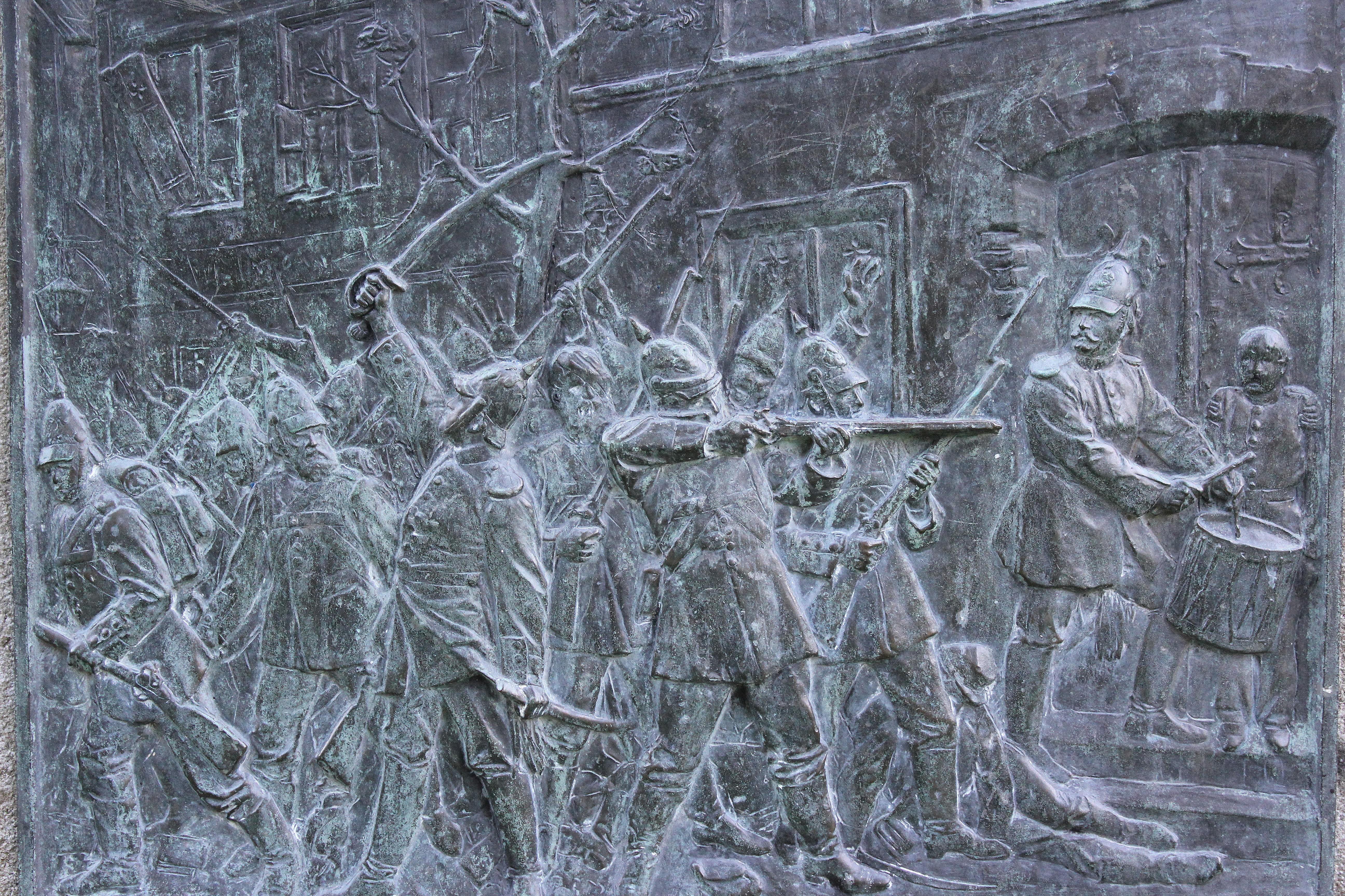 Relief, Der Trommler von Kolding vom Wrangel-Denkmal (Flensburg), Bild 03